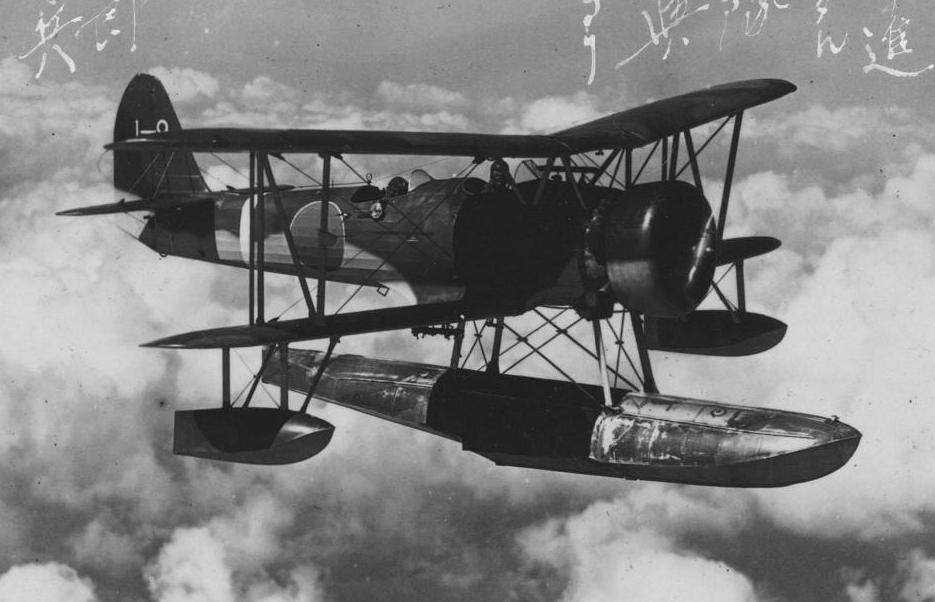 95式水偵